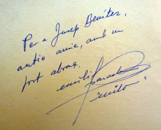 Dedicatòria de Milo Panach al fulletó del seu poema "Cant al segle XXI", guanyador dels Jocs Florals de València de 1962.